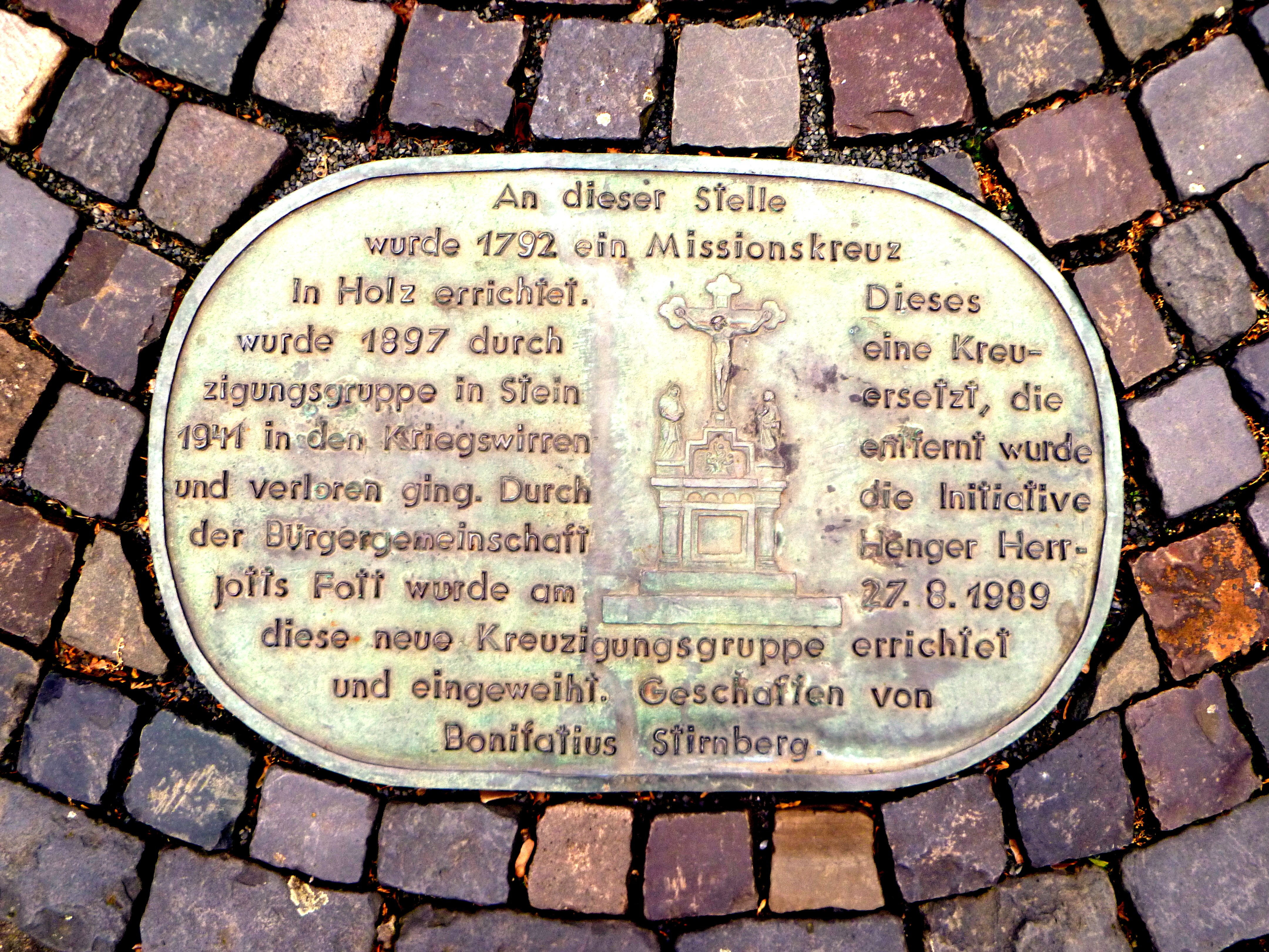 Kreuzigungsgruppe Aachen von Bonifatius Stirnberg - Plakette mit Geschichte